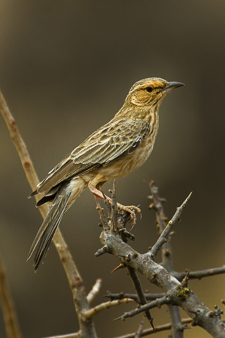 Pink-breasted Lark - KenyaIMG_6762